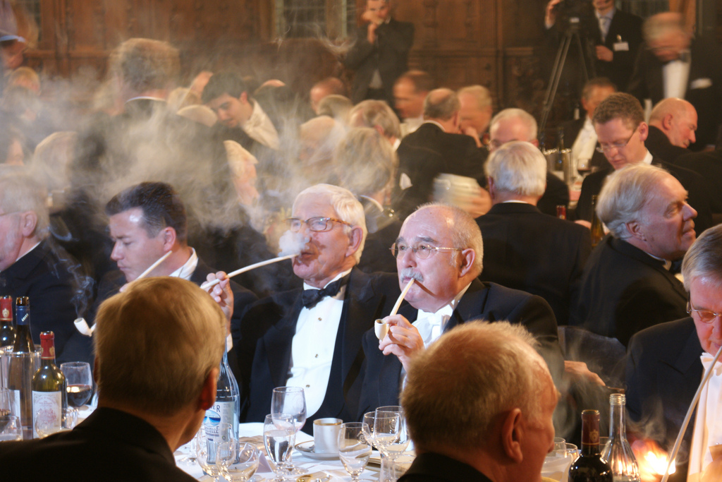 „Stimmungsbild“ von der 465. Schaffermahlzeit 2009 von Haus Seefahrt in der Oberen Rathaushalle des historischen Rathauses in Bremen, Deutschland: Zum Abschluss des traditionellen Festessens wird Tabak in langstieligen Tonpfeifen geraucht und Mokka getrunken.